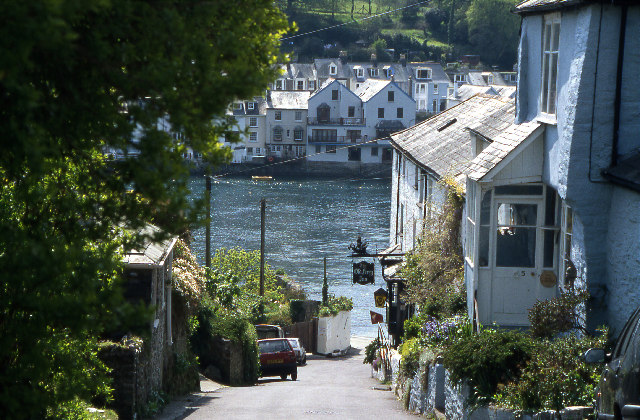 Bodinnick village